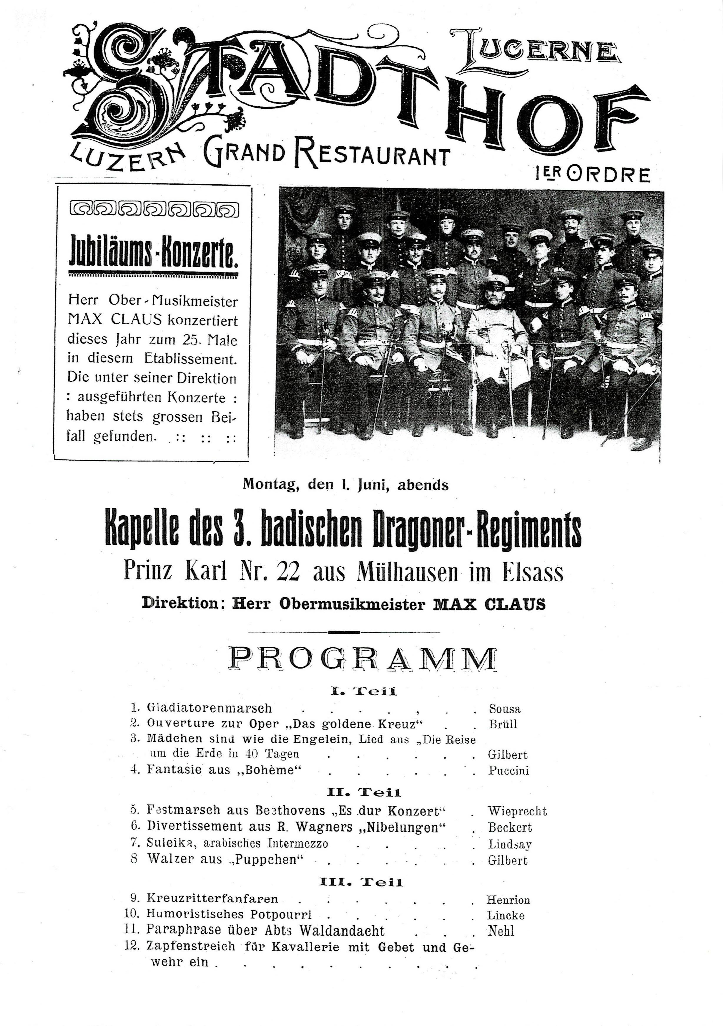 3. Badisches Dragoner-Regiment "Prinz Karl" Nr. 22